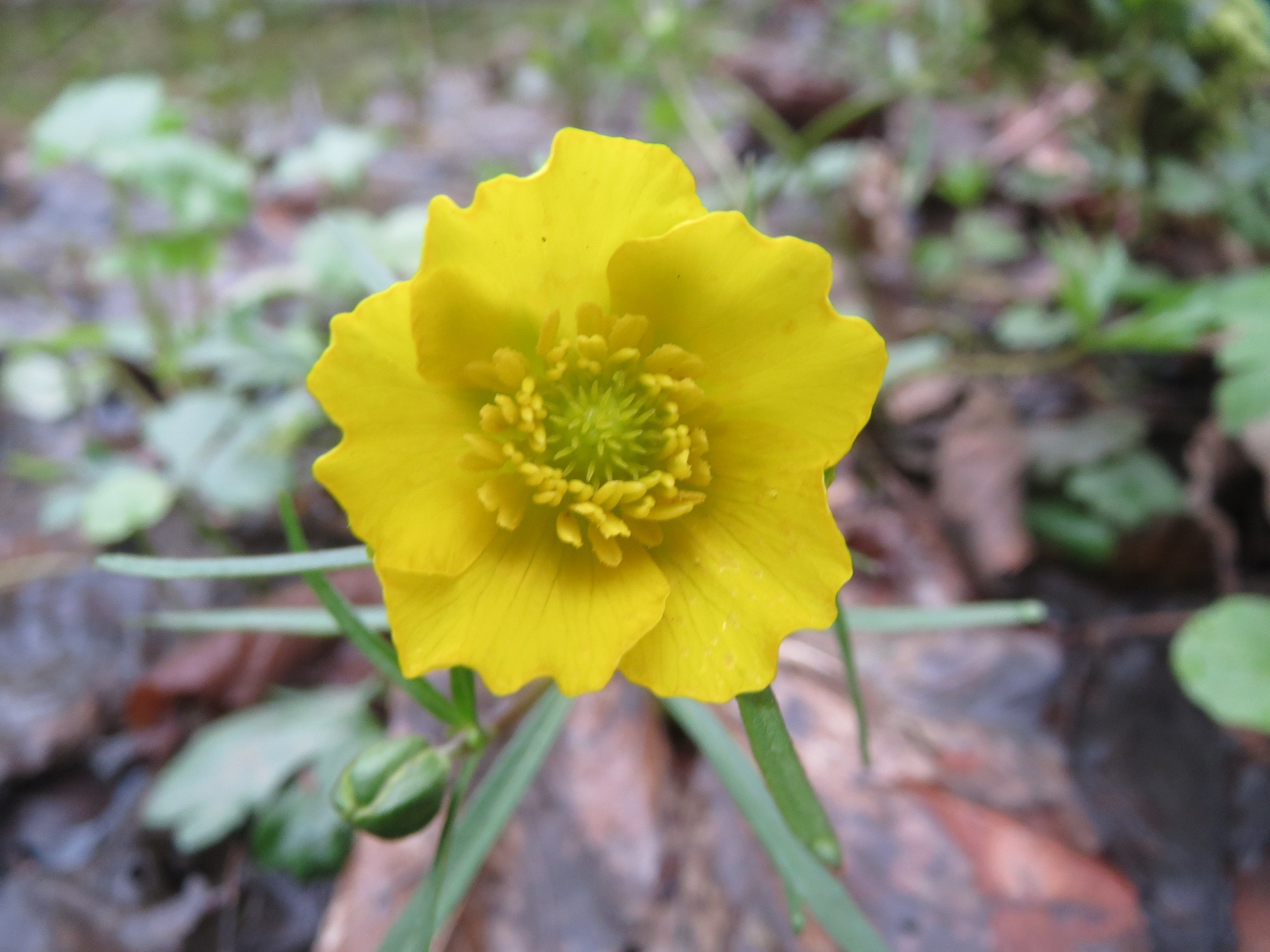 Gold-Hahnenfuß (Ranunculus auricomus) im Brettwald (Malscher Aue)